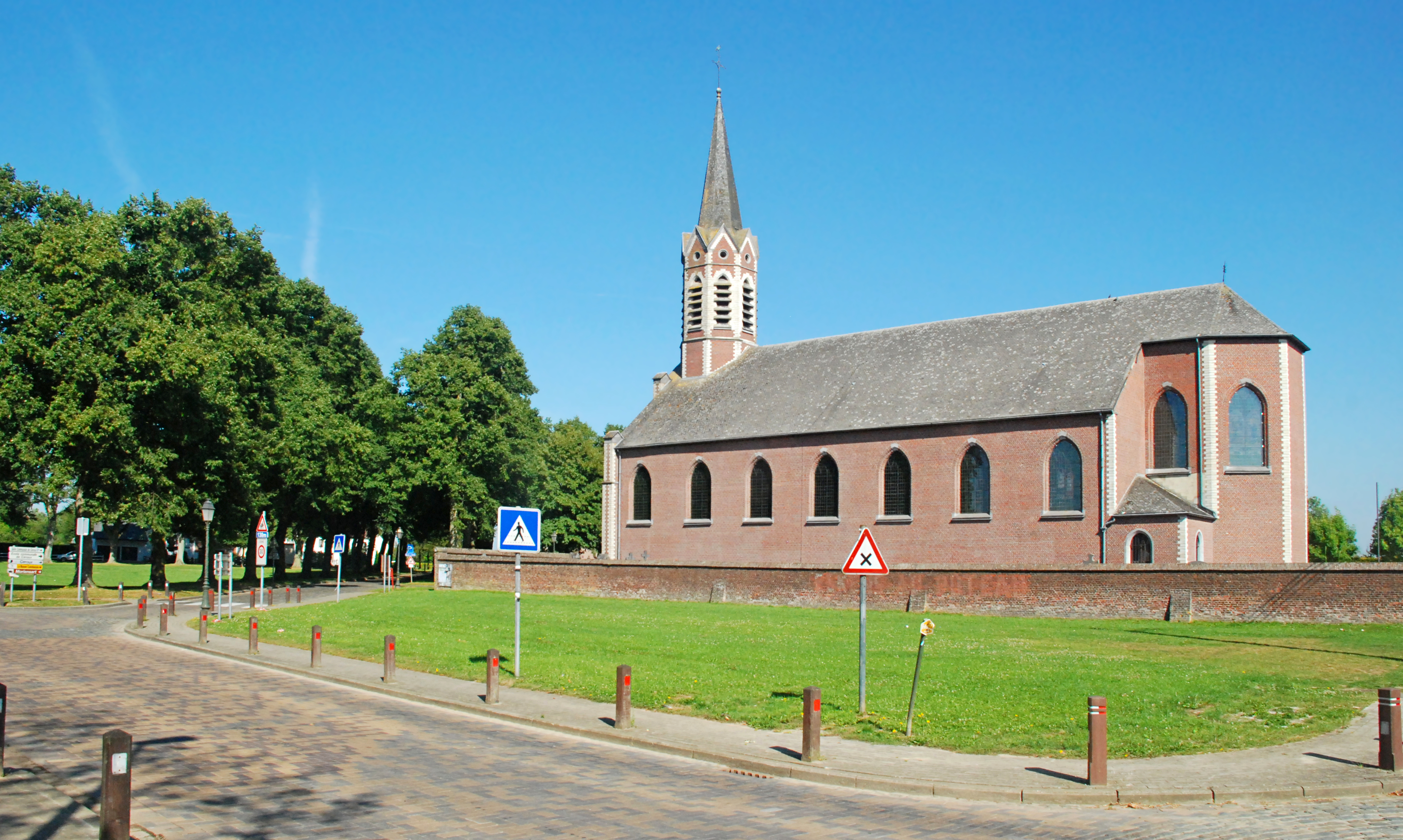 Belgique - Brabant wallon - Ottignies-Louvain-la-Neuve - Céroux - église Notre-Dame de Bon Secours (néo-gothique, Antoine Moreau, 1845)